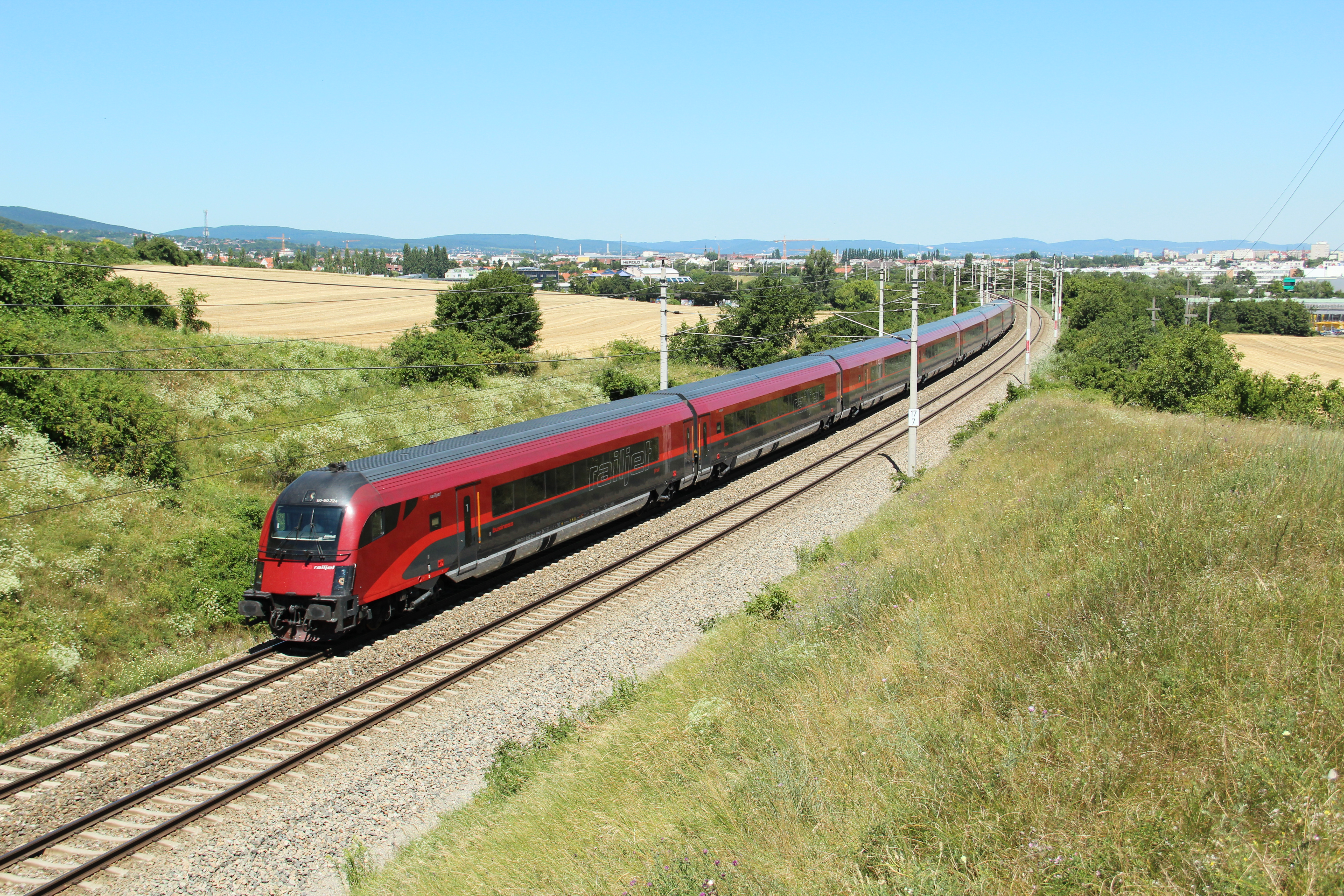 Ein railjet fährt hier zwischen Mödling und Guntramsdorf Richtung Süden